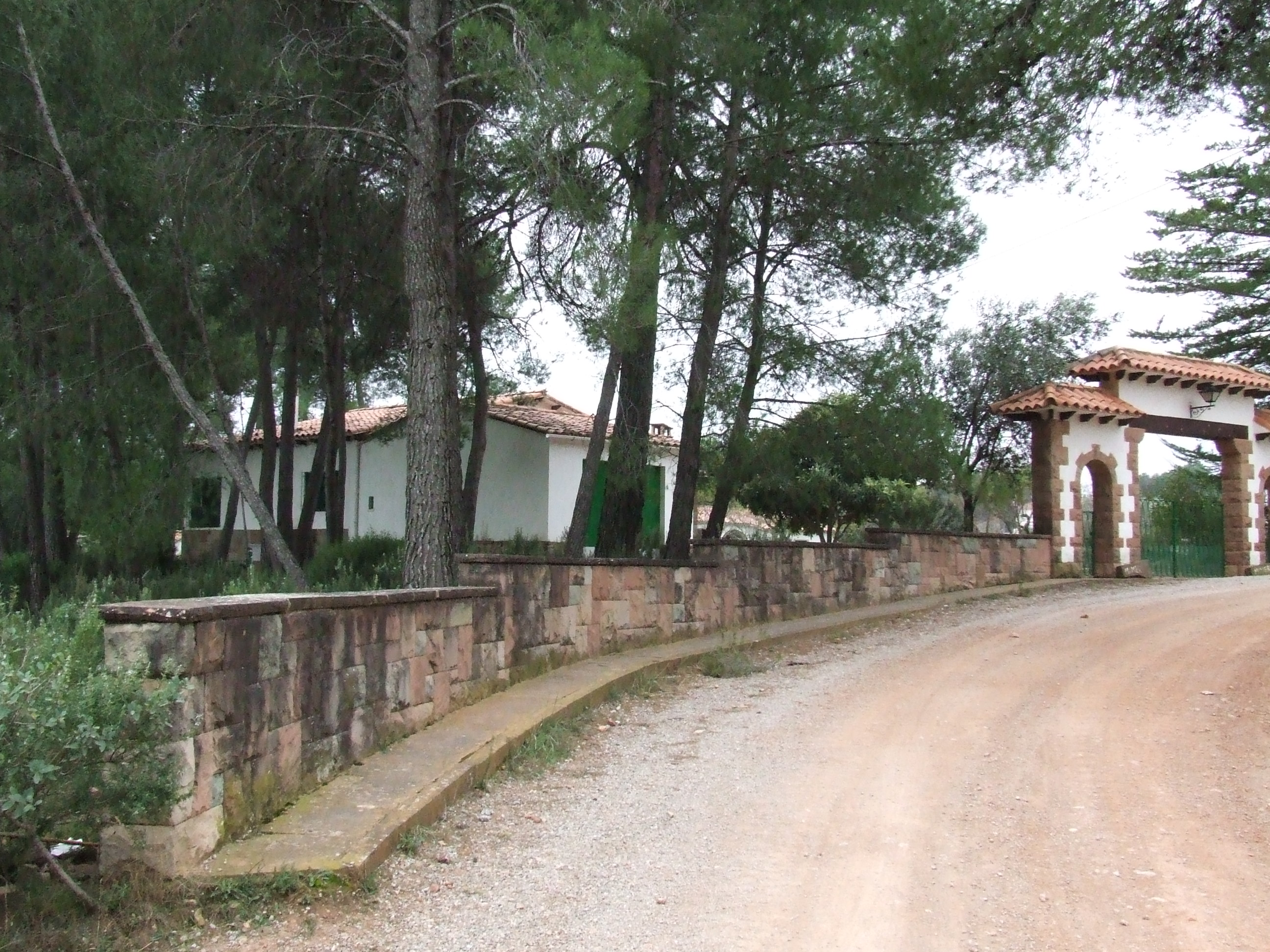 Can Mimeri (Riells del Fai, Bigues i Riells, Vallès Oriental)